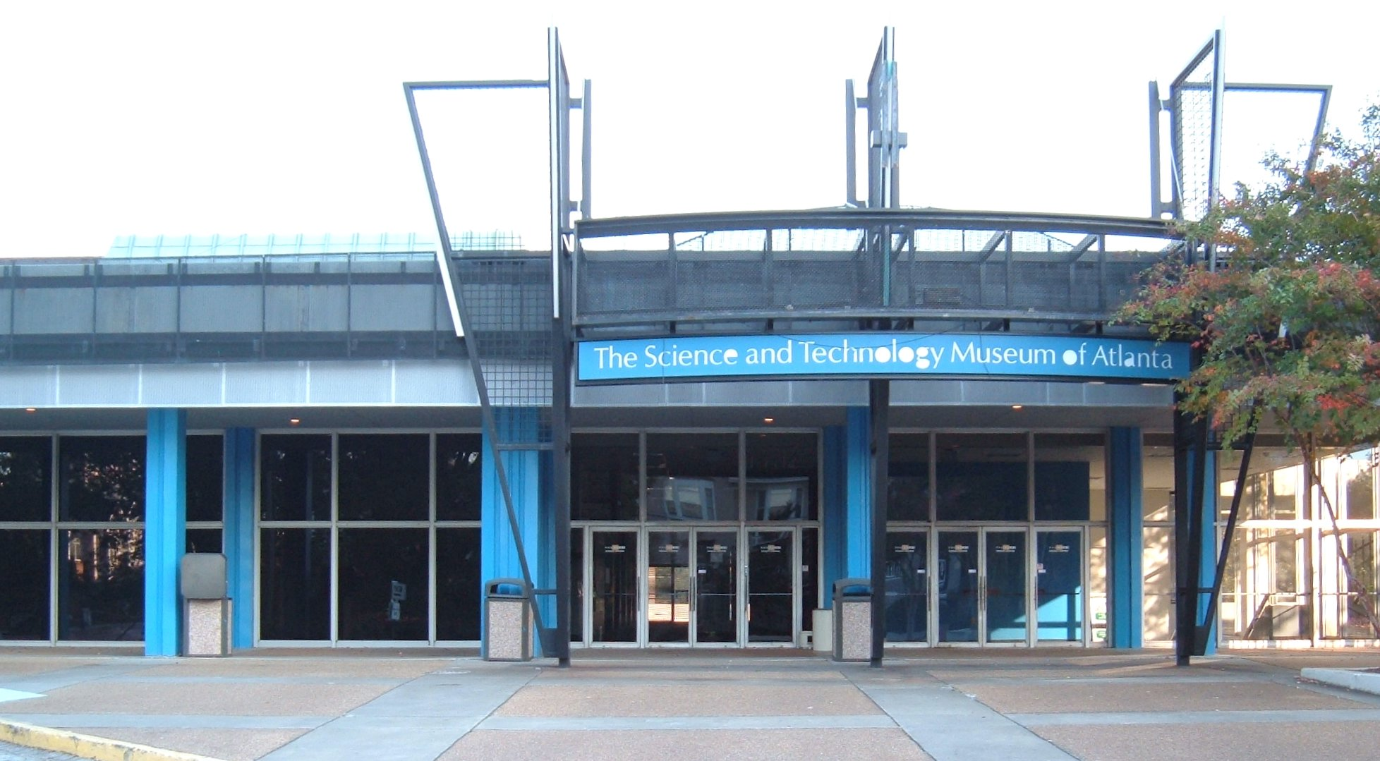 SciTrek in Atlanta, GA, USA